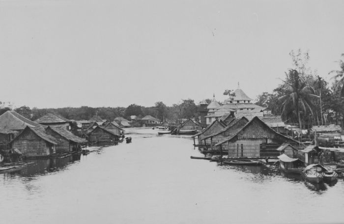 foto. Gezicht op Sambas, West-Borneo.